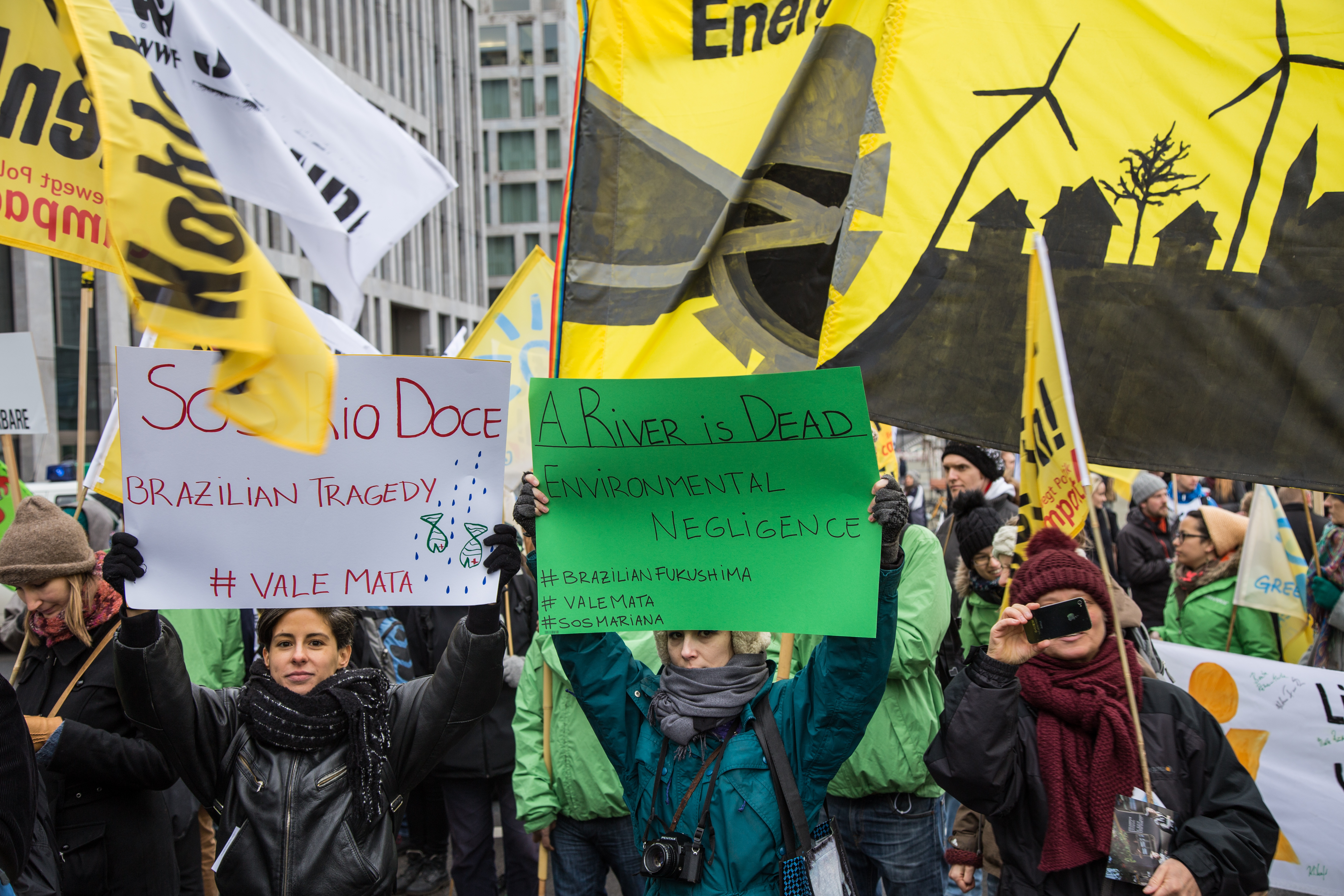 Am 29. November 2015 gingen, anlässlich der Weltklimakonferenz COP21 in Paris, ca. 17.000 Menschen in Berlin auf die Straße um auf dem weltweit stattfindenden Global Climate March für echten Klimaschutz zu demonstrieren. Trägerkreis des Protests in Deutschland waren Avaaz, Campact, Greenpeace, Klima-Allianz, NABU, Oxfam & WWF.